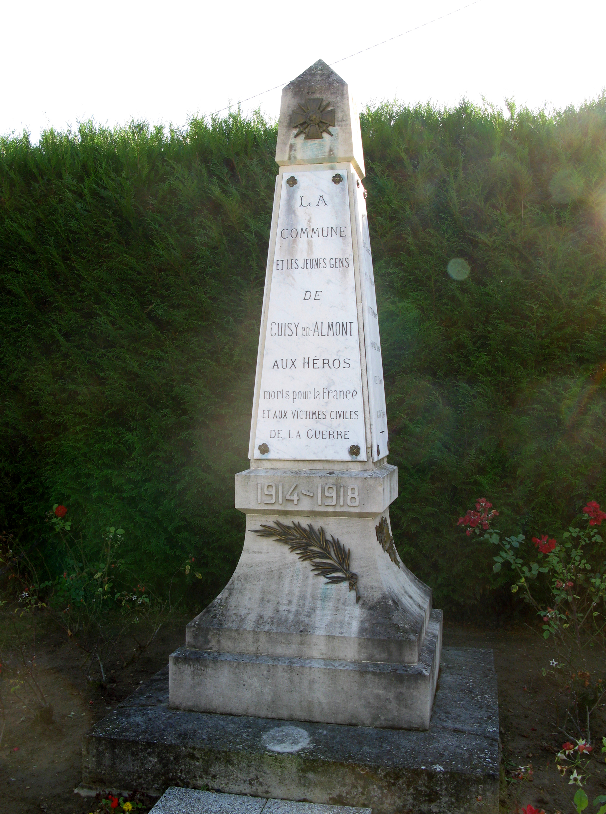 Cuisy-en-Almont (Aisne, France) - Le monument-aux-morts. . (Désolé ! ... problèmes de reflets parasites dus au soleil de face !).